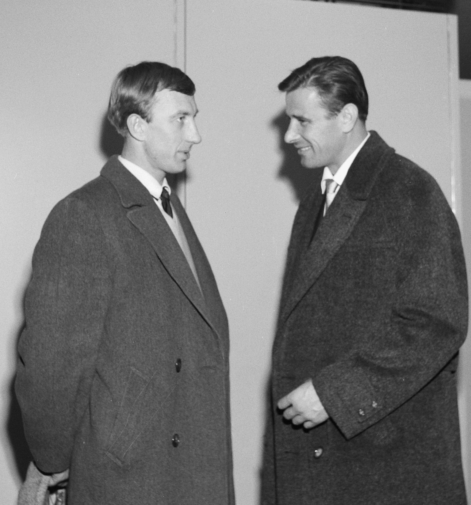 Aankomst Russische voetballers op Schiphol. Lev Jasjin (rechts) en Igor Netto in gesprek